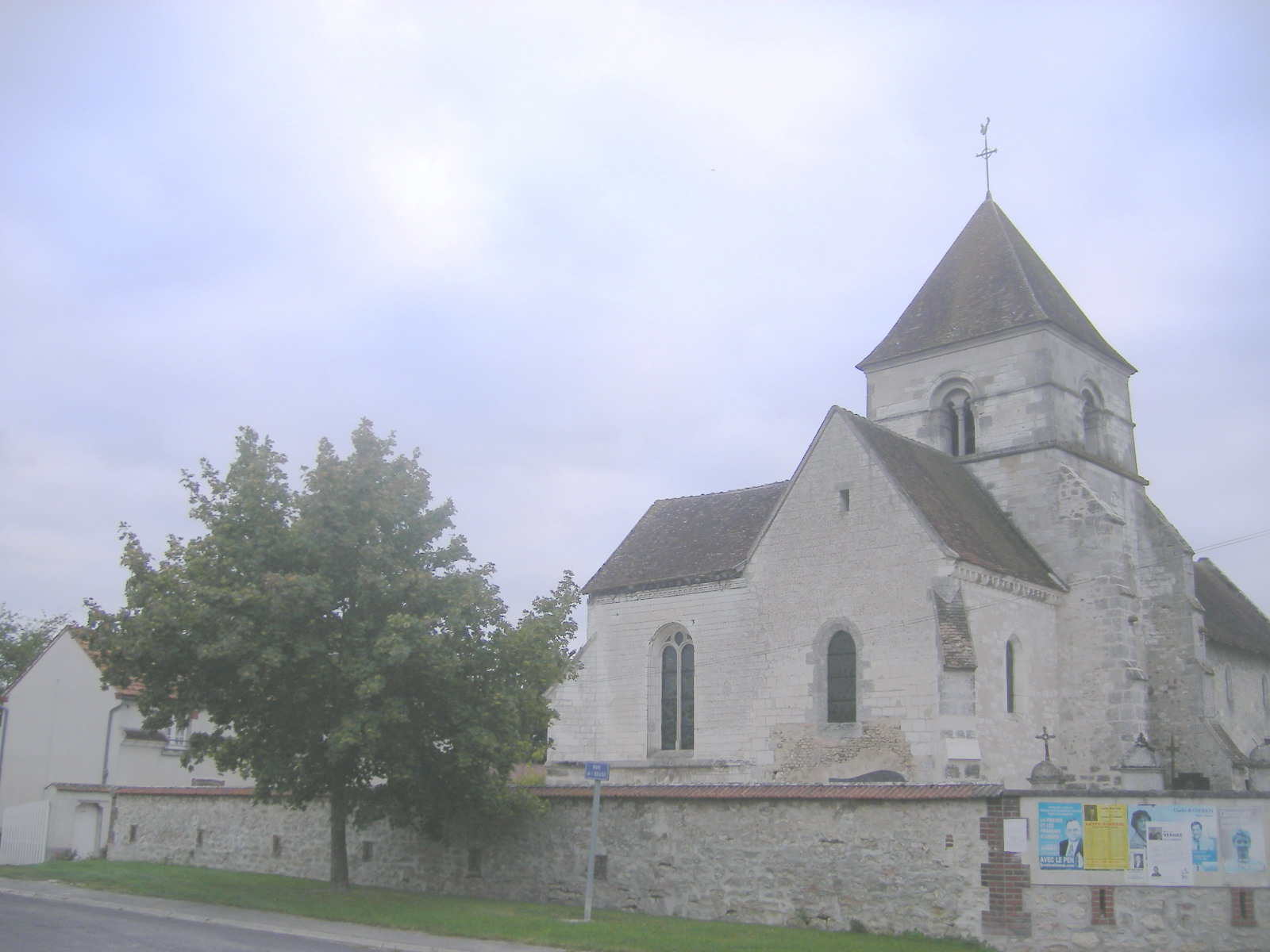 Euvy